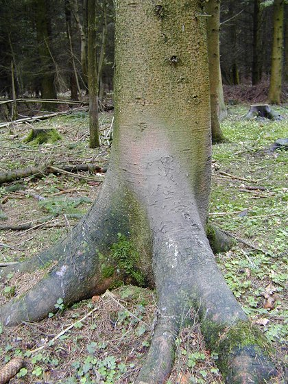 Malbaum, das Scheuern durch Wildschweine führt zu abgeriebener Rinde und anhaftendem Schlamm